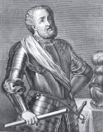 Retrato de Rodrigo Díaz de Vivar, el Cid Campeador.